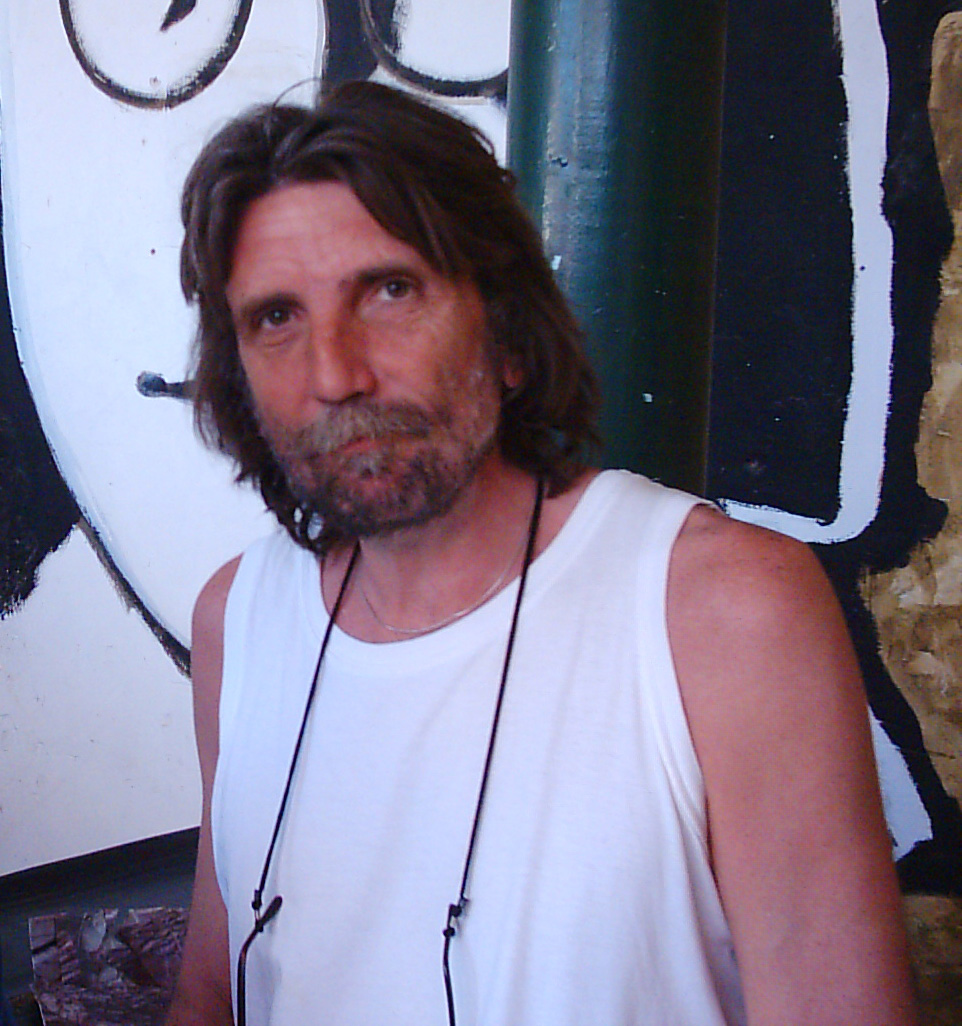 Fotografía del músico uruguayo Luis Trochón